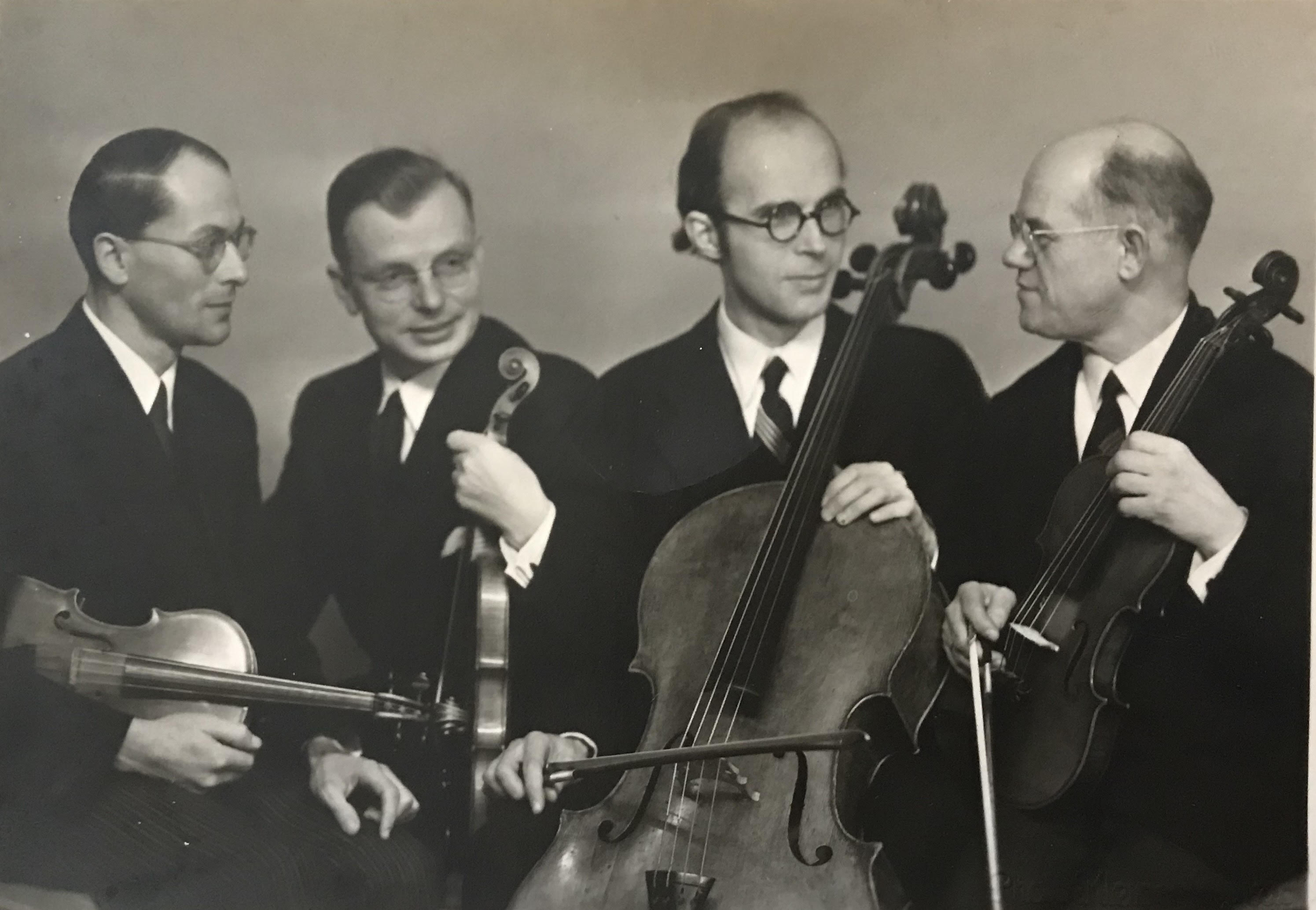 v. l. n. r.: Max Brettschneider, Georg Grübnau, Johannes Hannemann, Alfred Scholz